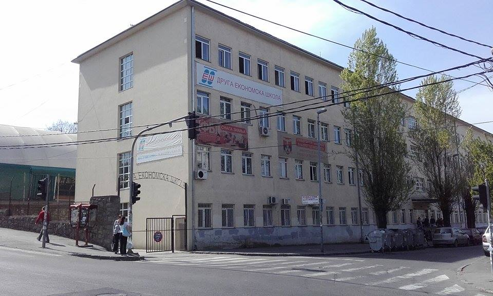 april 2016.